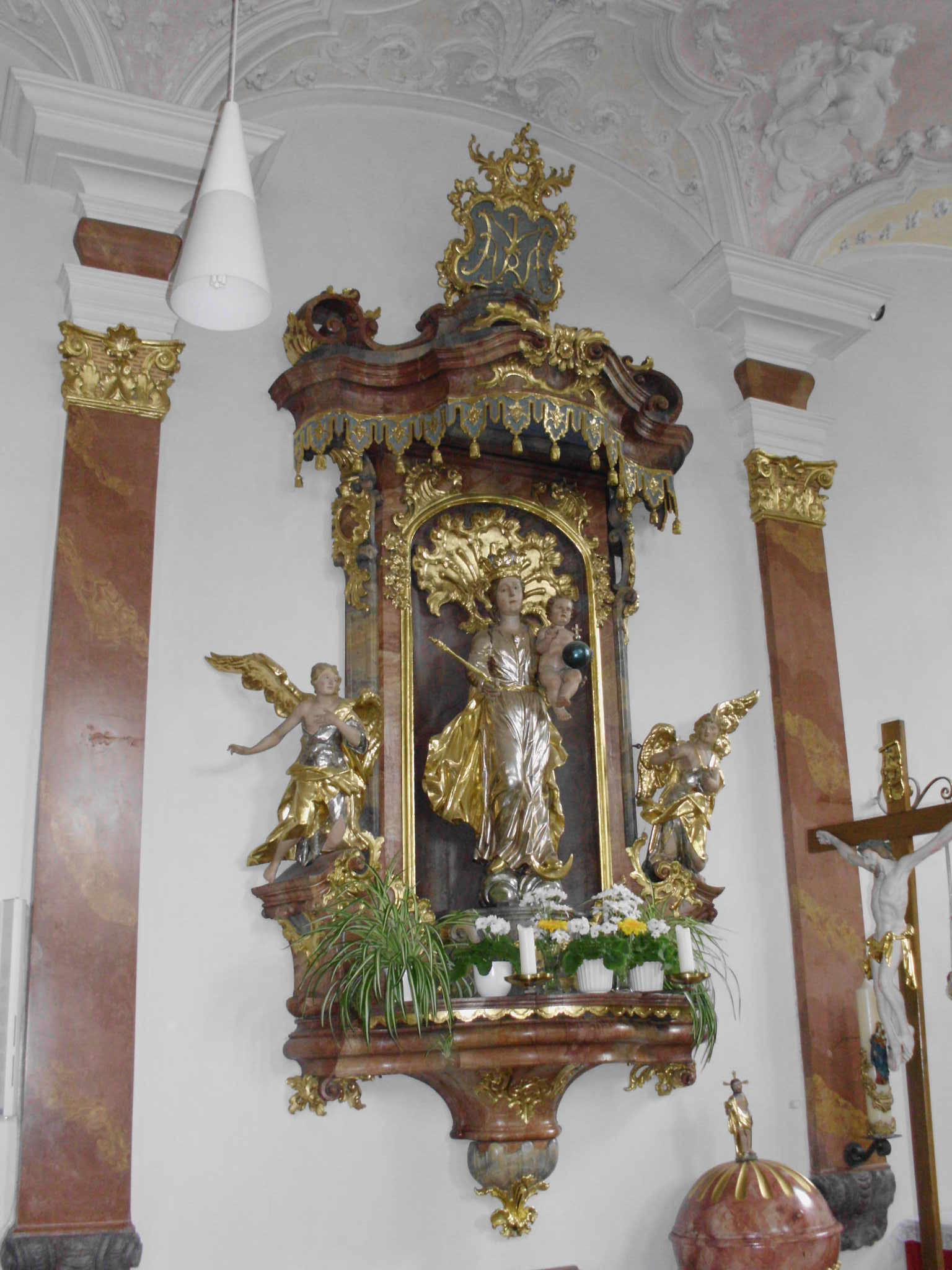 Absberg, Landkreis Weißenburg-Gunzenhausen (Bayern), Ehemaliges Deutschordensschloss, Schlosskapelle (heute Kath. Pfarrkirche St. Ottilia)